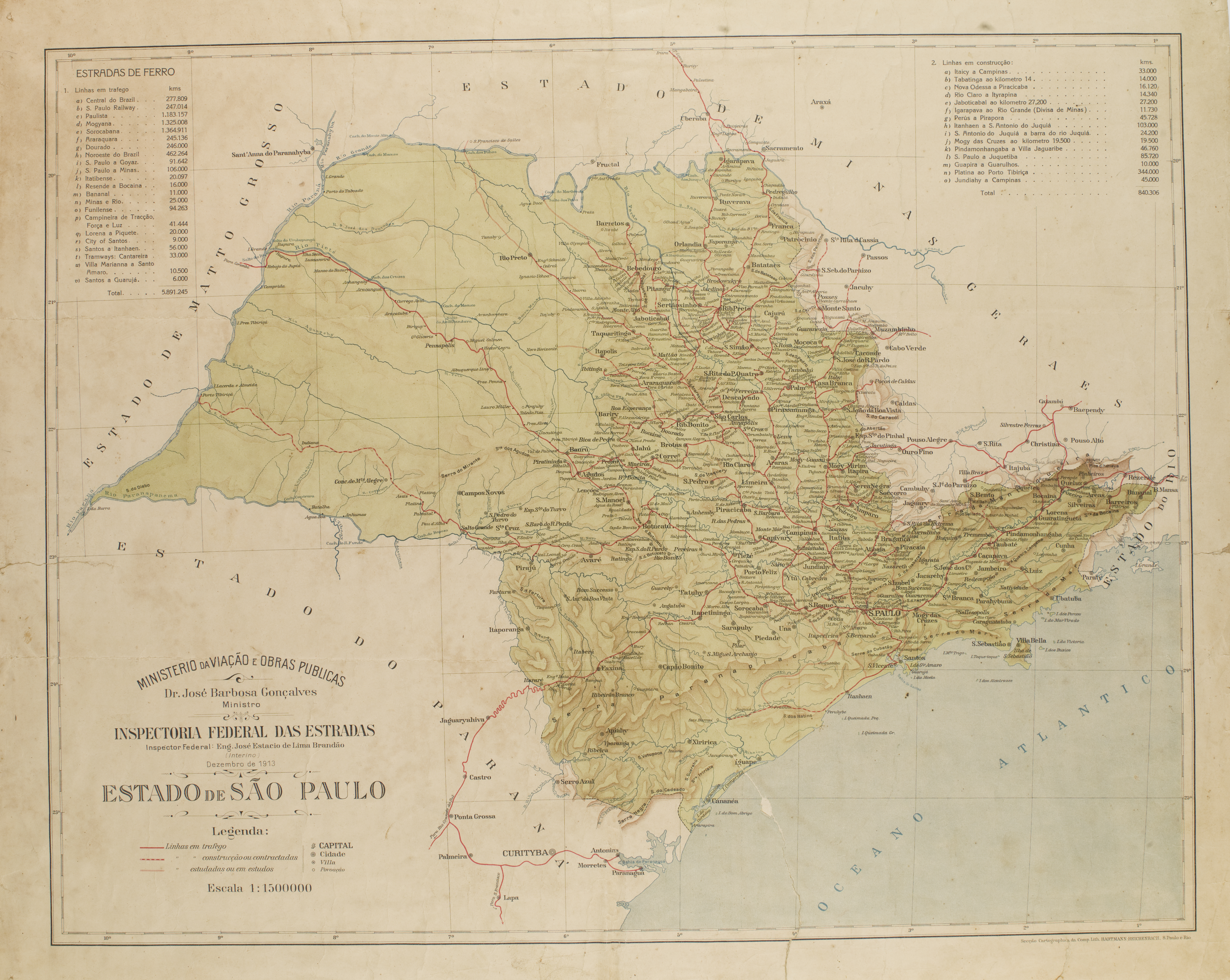 Obra que integra o acervo do Museu Paulista da USP. Coleção João Baptista de Campos Aguirra - Ref. Agente: Ministério da Viação e Obras Públicas - Seção Cartográfica da Companhia Litográfica Hartmann-Reichenbach (São Paulo e Rio de Janeiro)